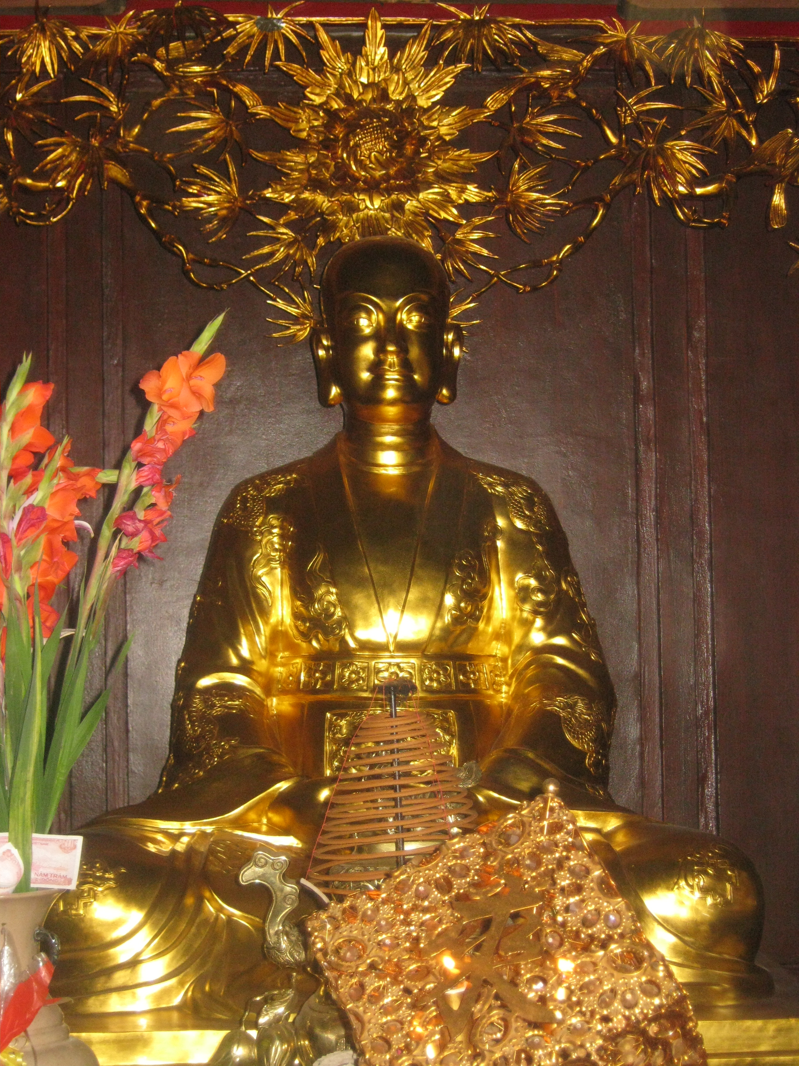 Ảnh chụp tại khu chùa Bái Đính tỉnh Ninh Bình.